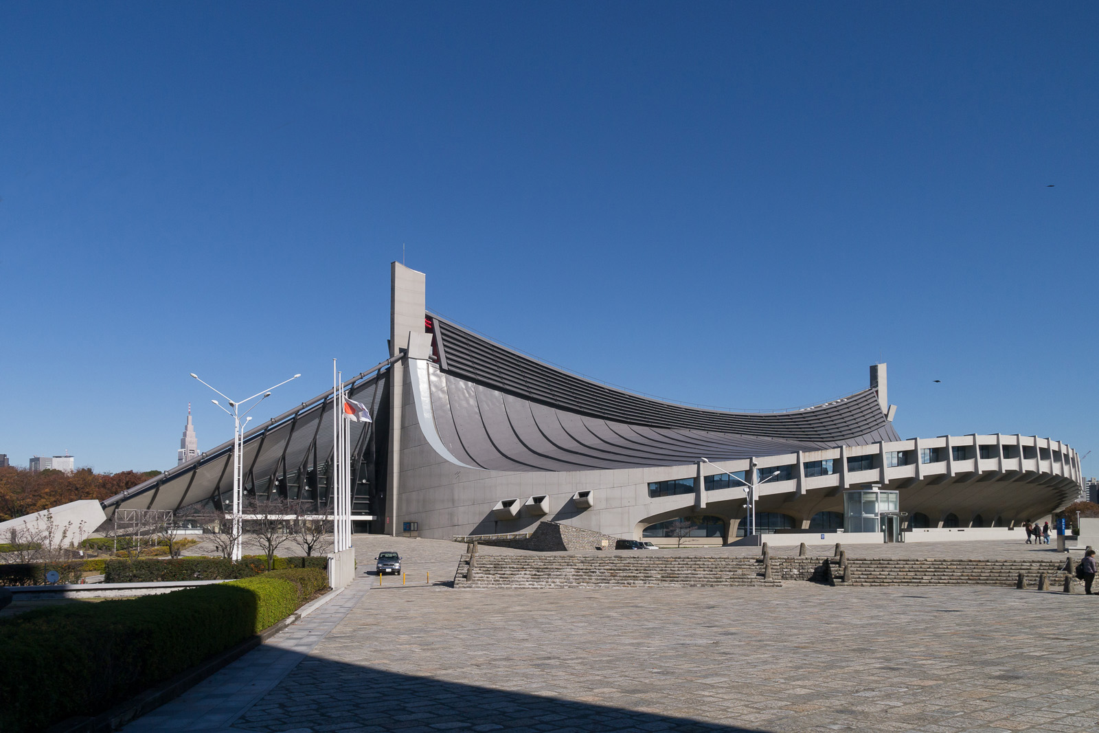 国立代々木競技場。